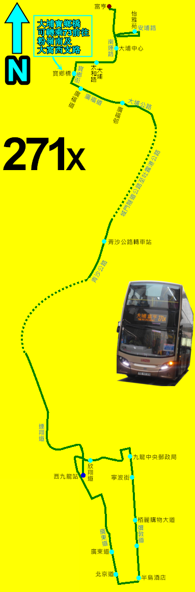 中文（香港）: 九巴271X線的走線圖